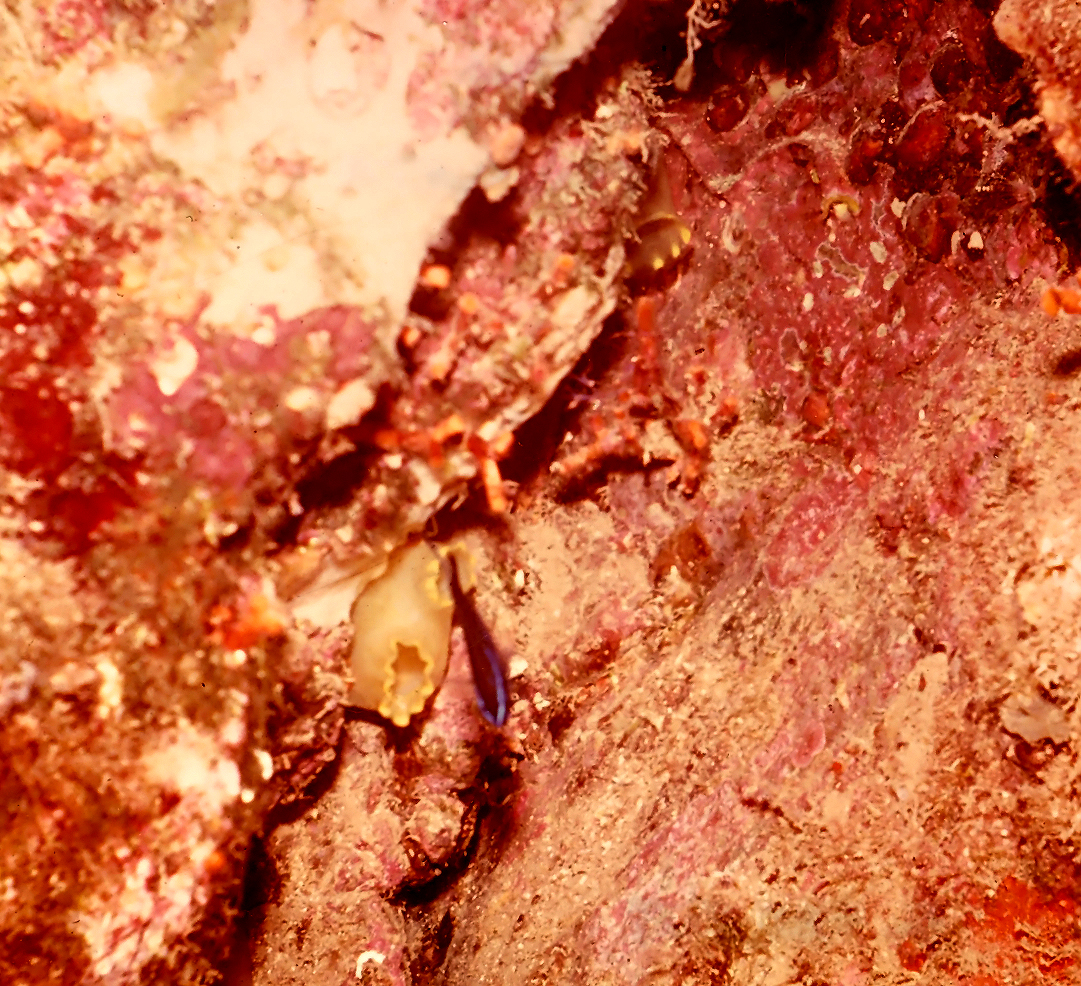 Ciona intestinalis (Linnaeus, 1767), Chromis chromis (juv.) (Linnaeus, 1758)